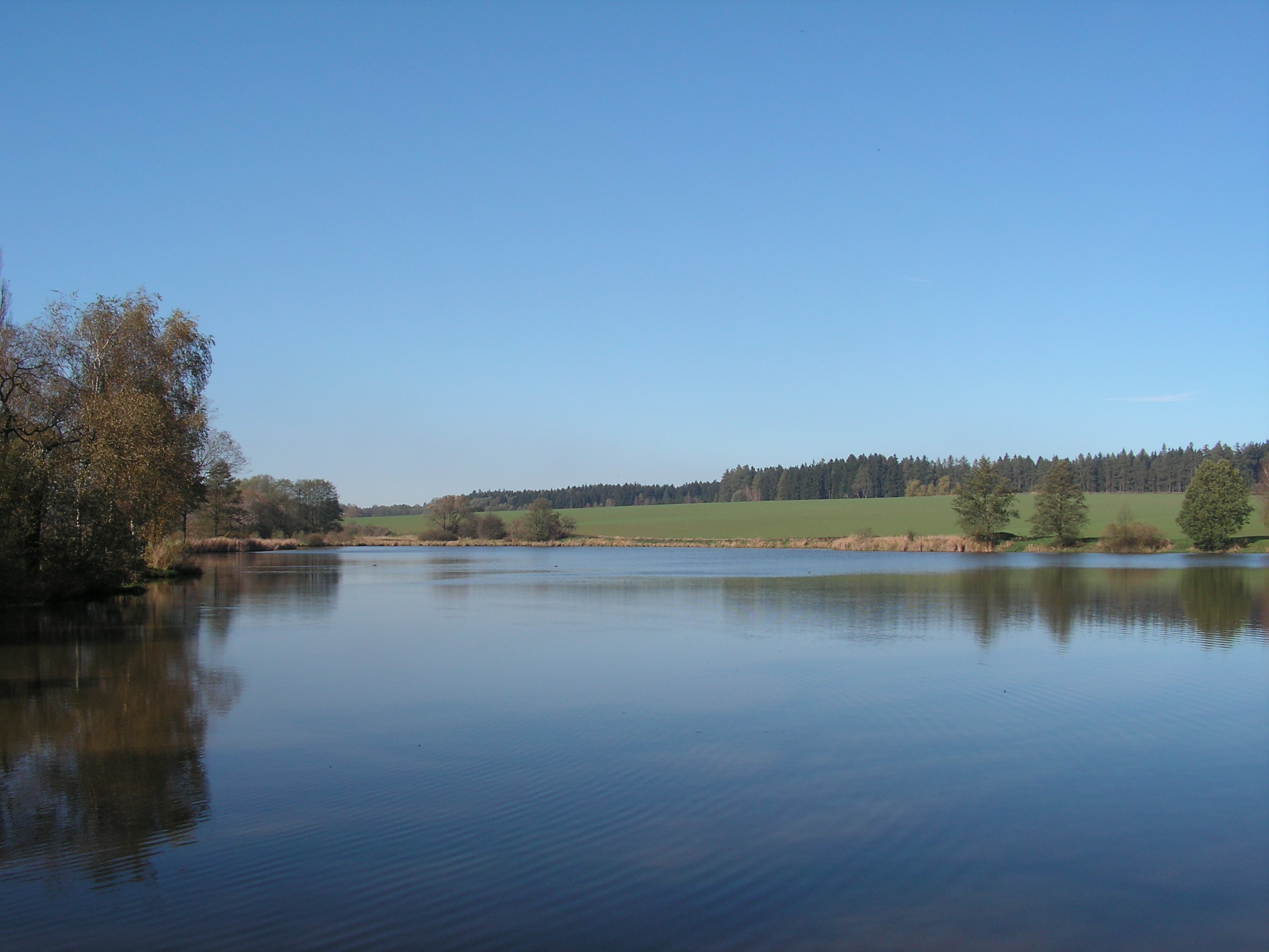 Pohled na Leštinský rybník, který se nachází v Leštině u Světlé v okrese Havlíčkův Brod.